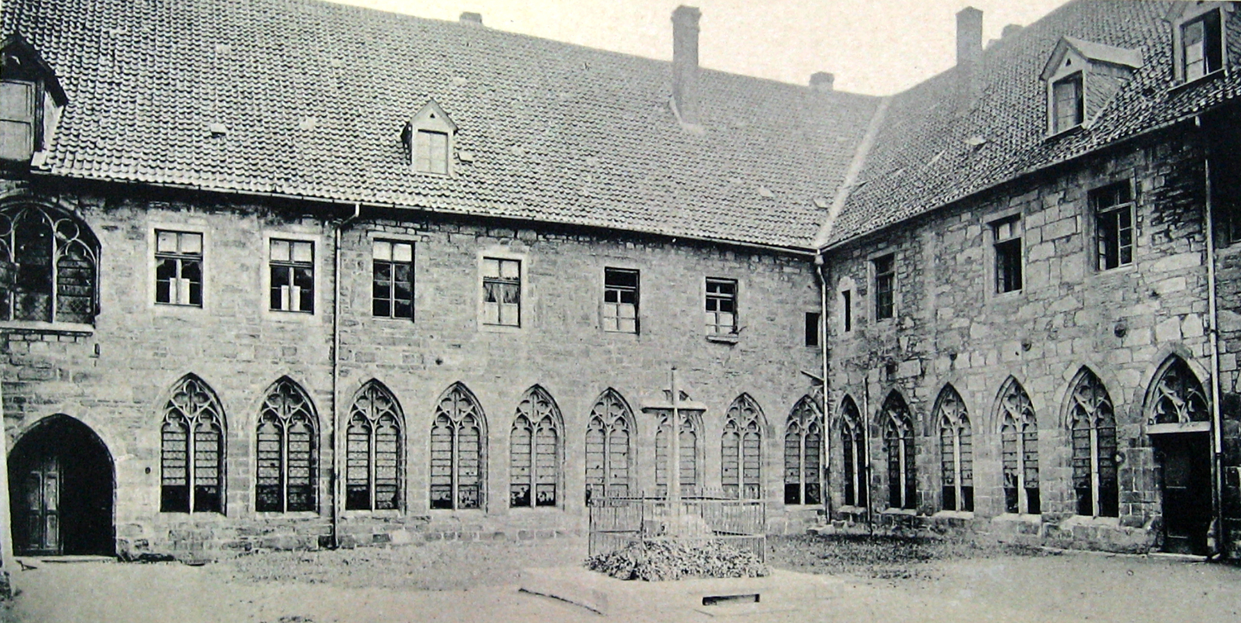 Propsteikirche Dortmund Kreuzgang Foto 1894